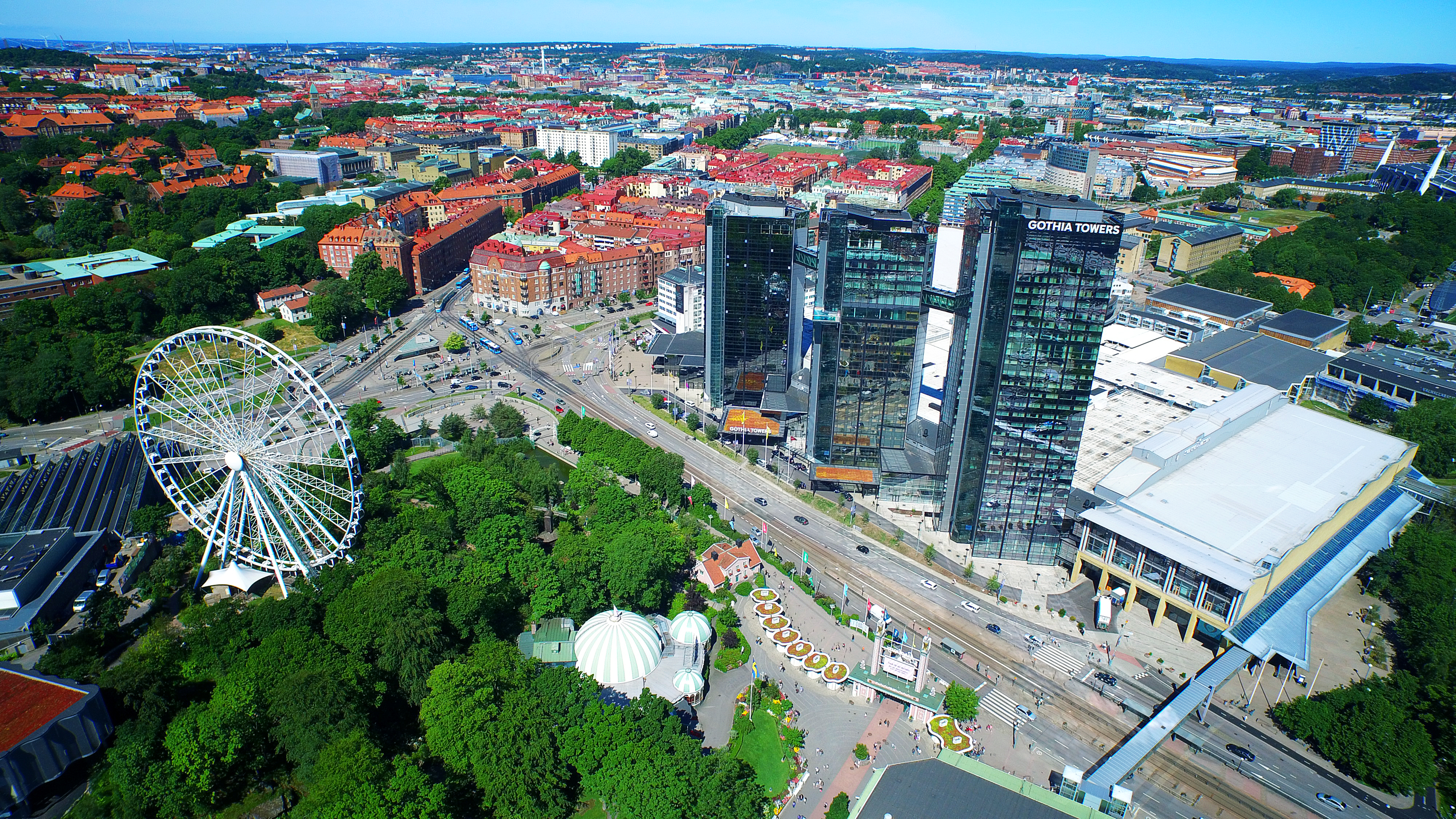 SMGT